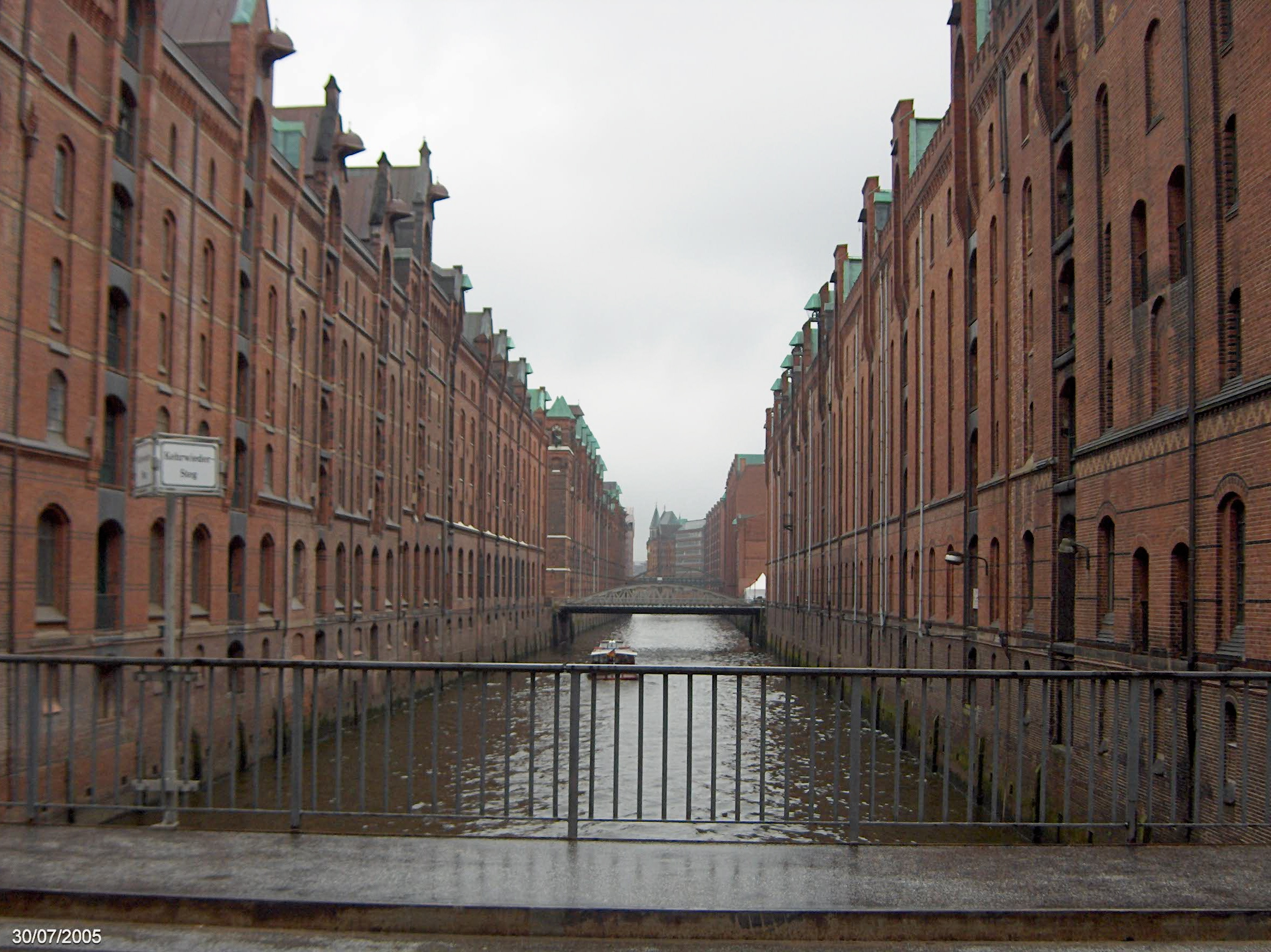 Blick in eine Fleet in der Speicherstadt vom Kehrwieder-Steg aus This is a photograph of an architectural monument.